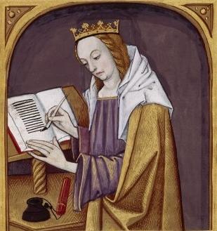 Carmenta, divinité romaine, écrivant. Miniature extraite de la collection De mulieribus claris de Boccace.